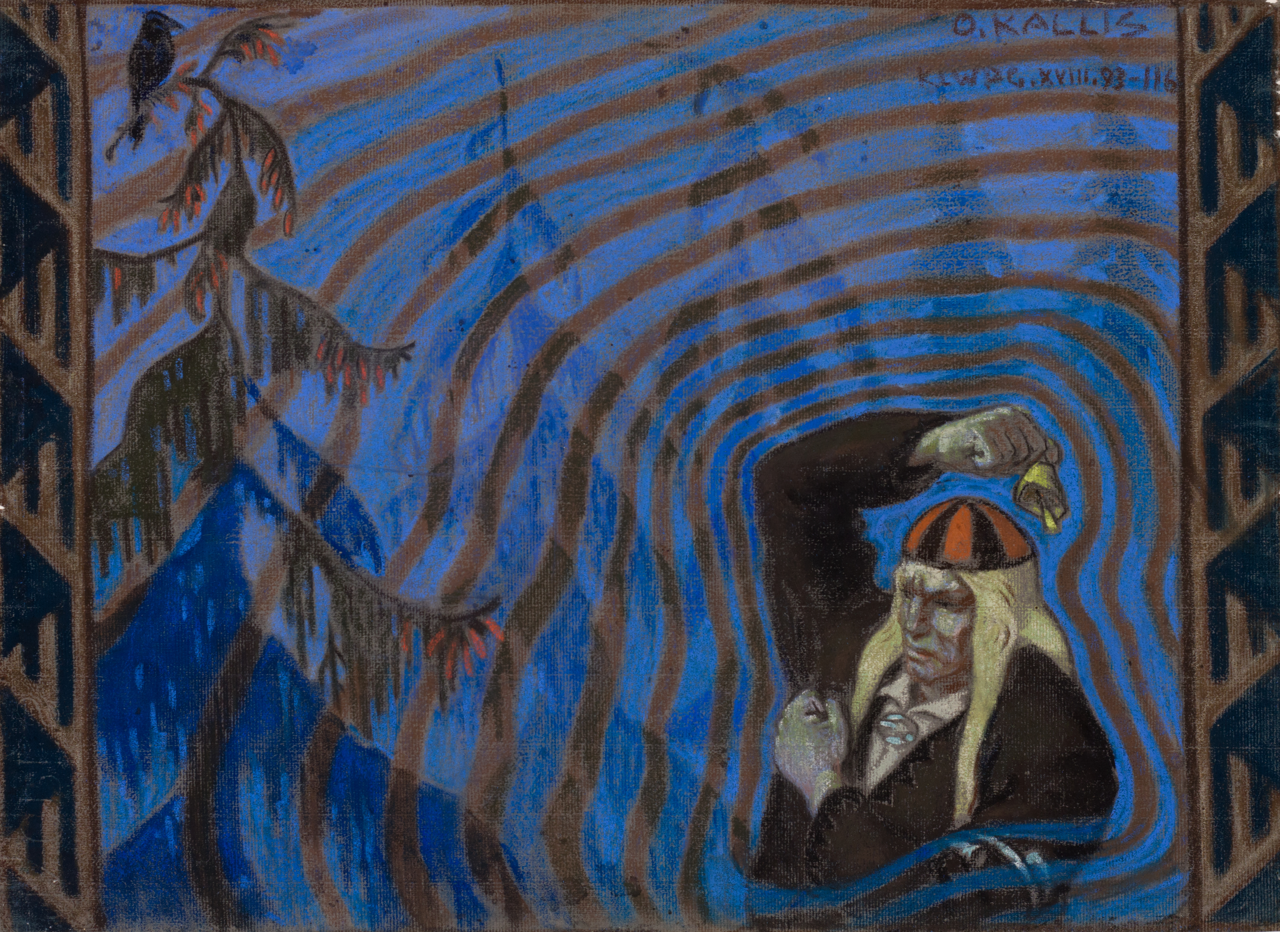 "Kalevipoeg kellukesega" ehk "Kalevipoeg kellukest helistamas"